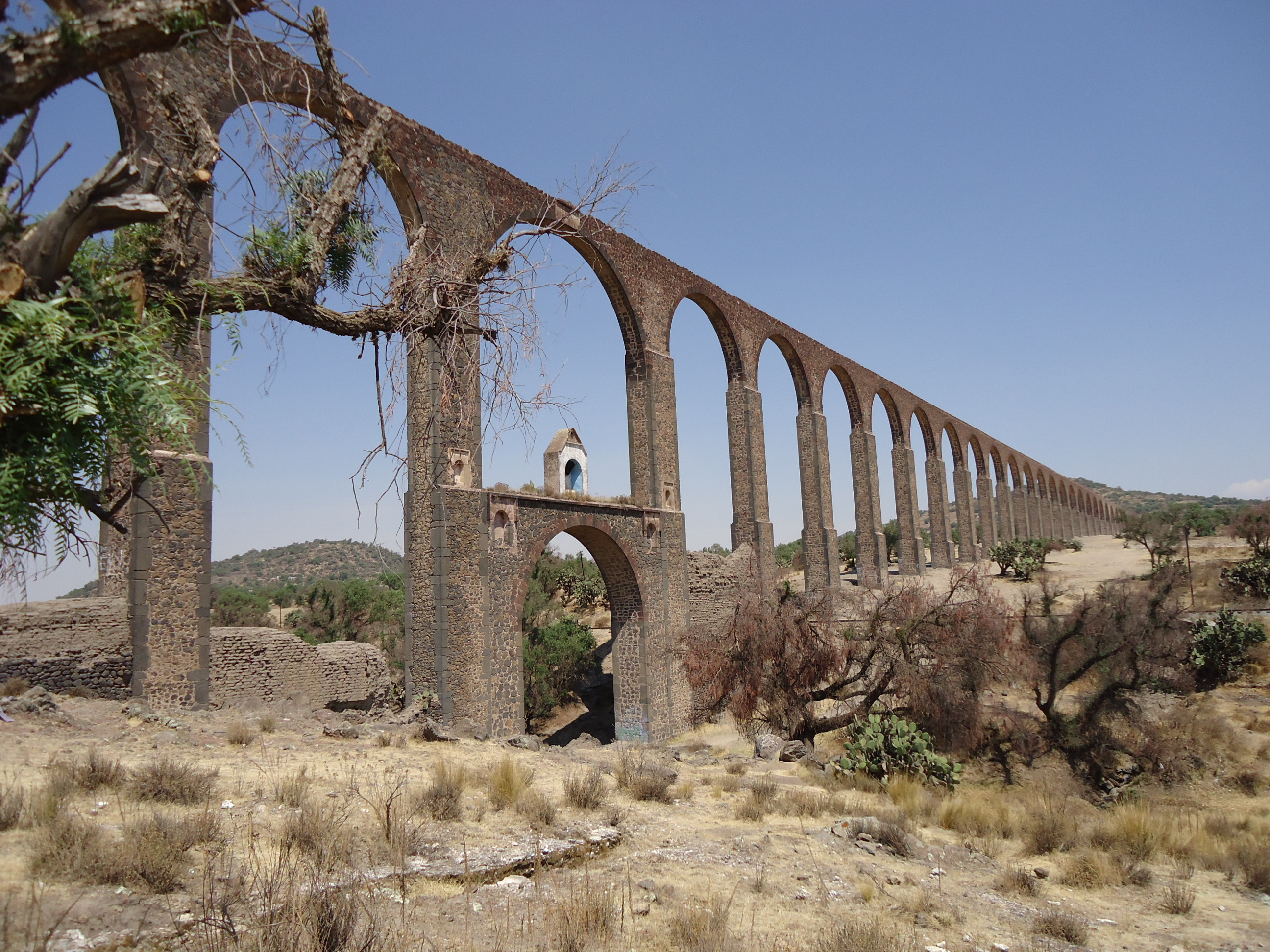 El acueducto más alto erigido en el siglo XVI en el continente americano.